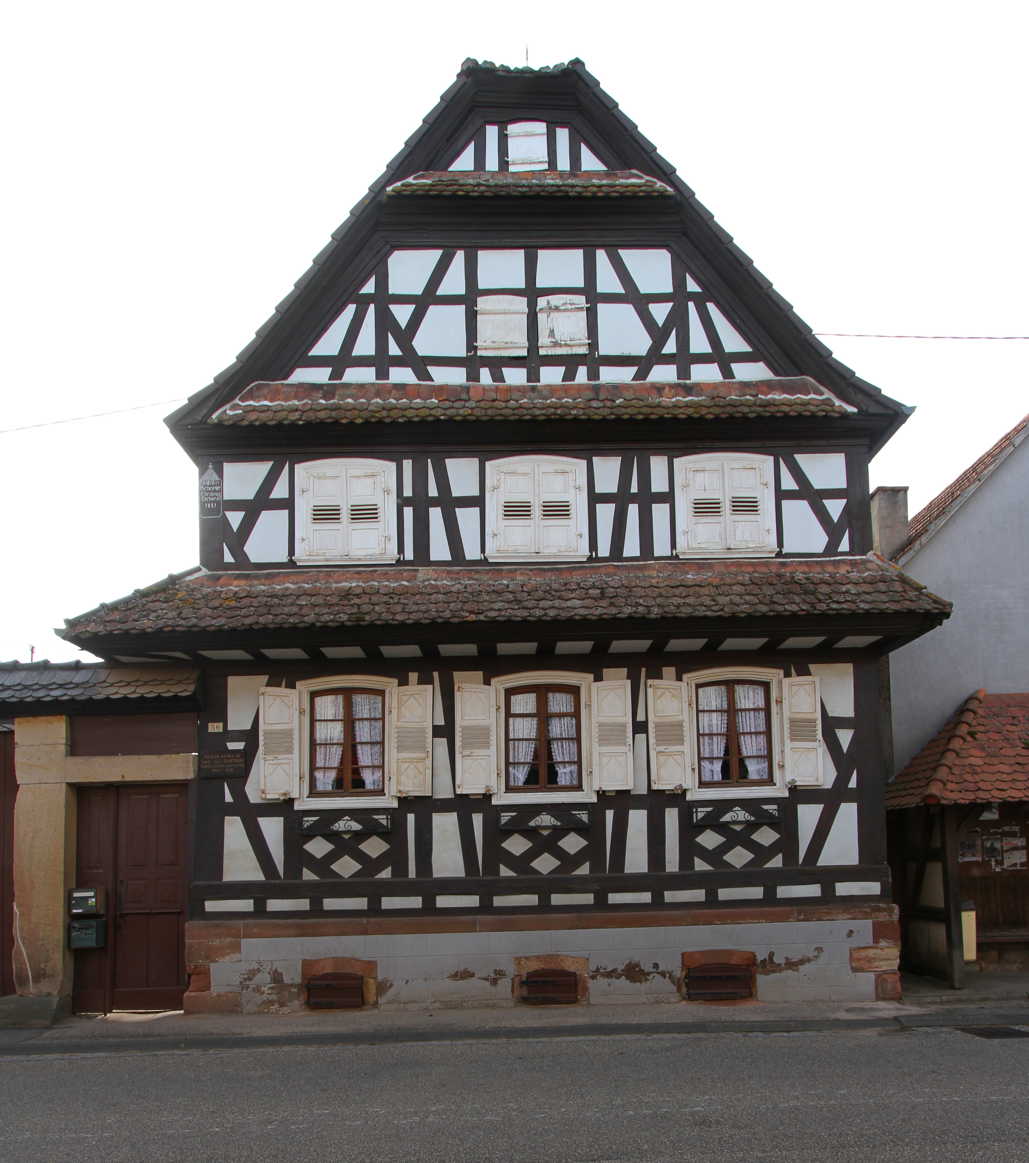 Steinseltz